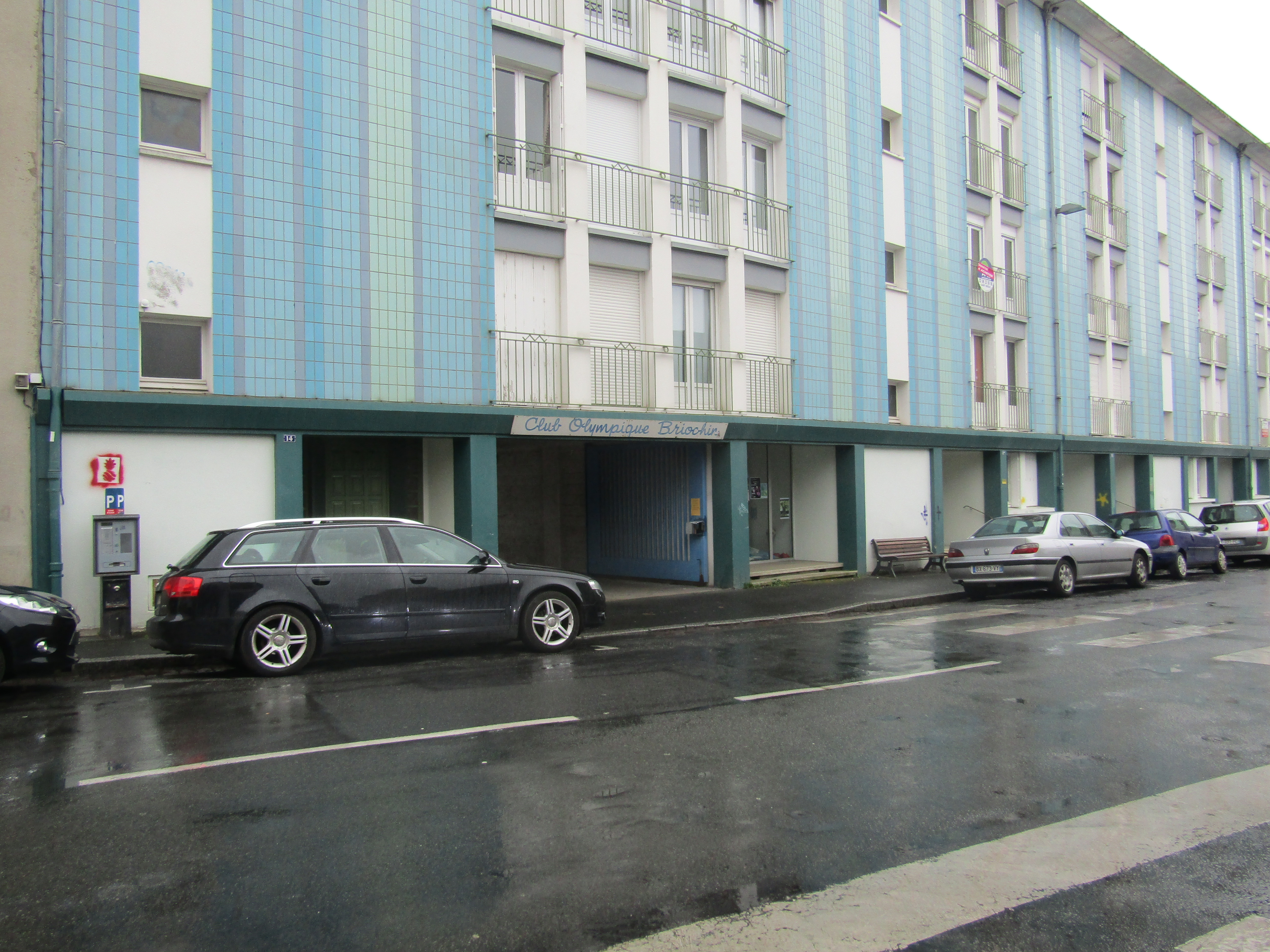 L'entrée du Club Olympique Briochin rue St-Benoît à Saint-Brieuc